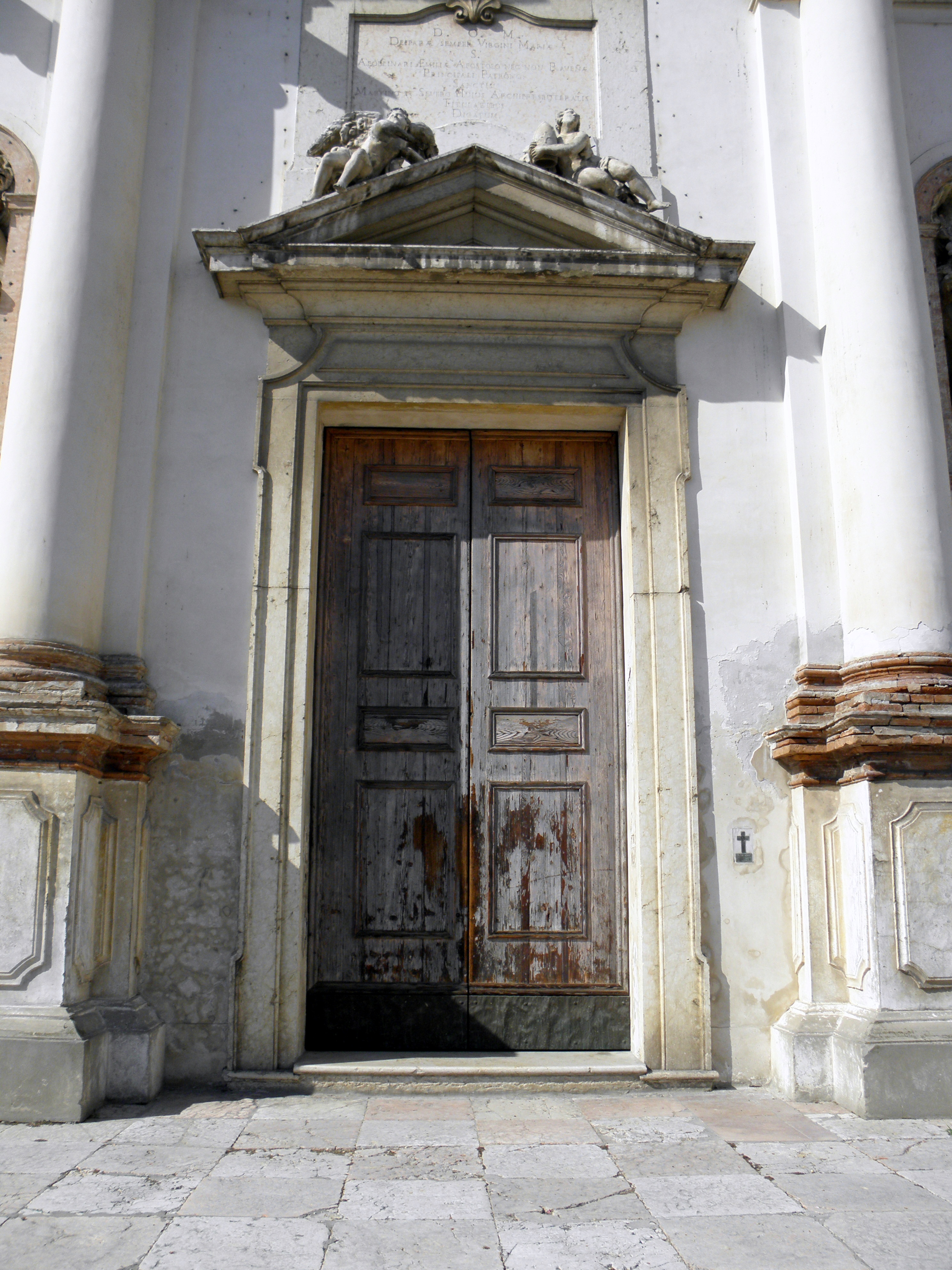 Crespino: portale della chiesa parrocchiale dei Santi Martino e Severo.